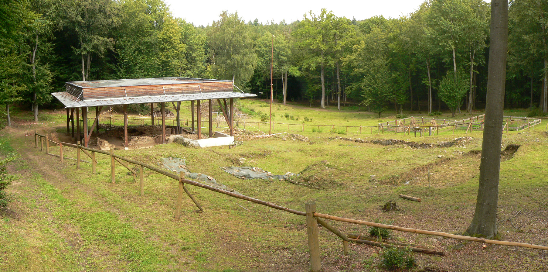 Grabungsgelände mit freigelegtem Herrenhaus unter Schutzdach der Villa Rustica Weiler